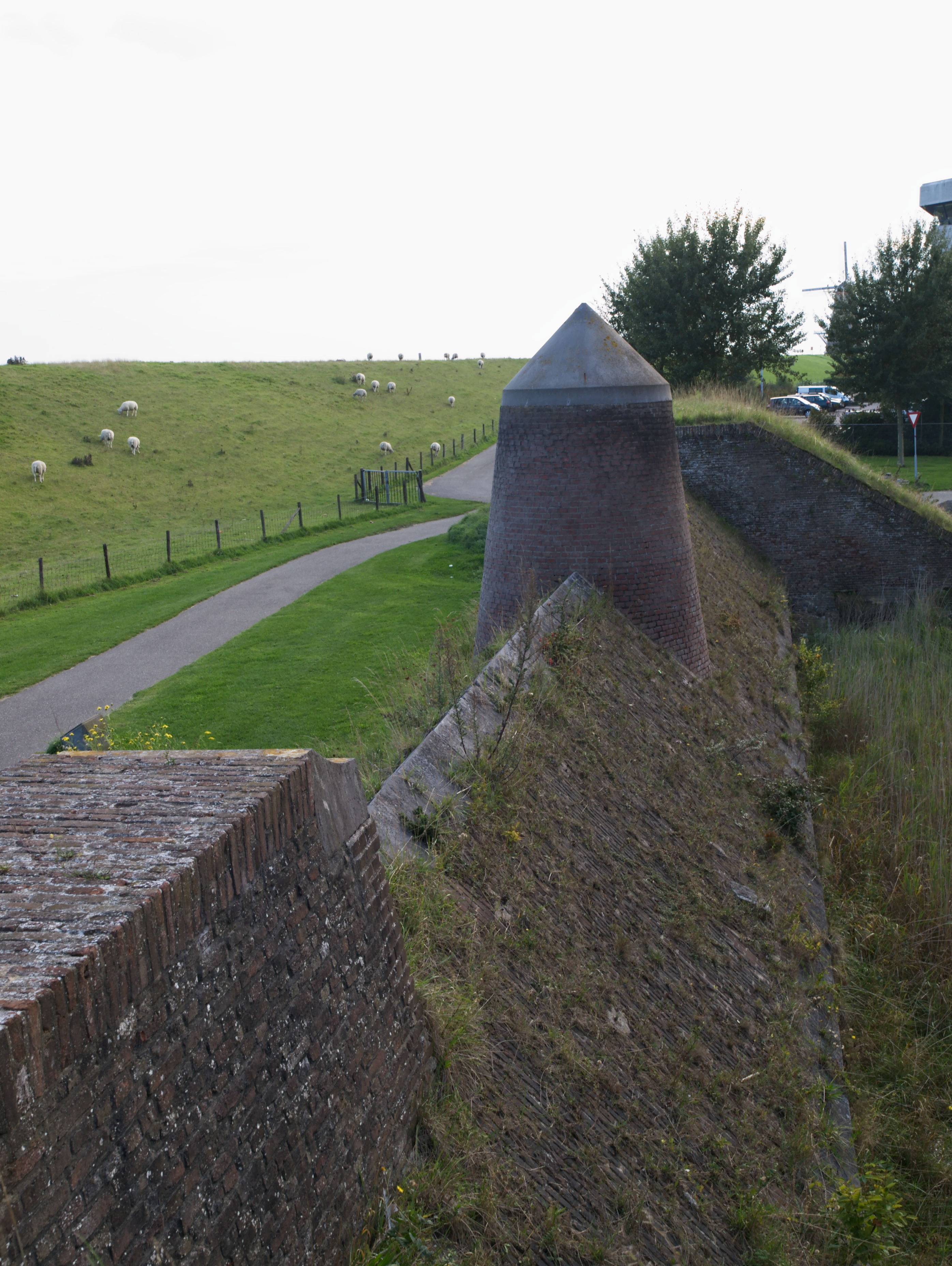 Rijksmonumenten De "Oostbeer" aan de Commandoweg te Vlissingen (landzijde rechts). De beer dateert uit de Napoleontische tijd.